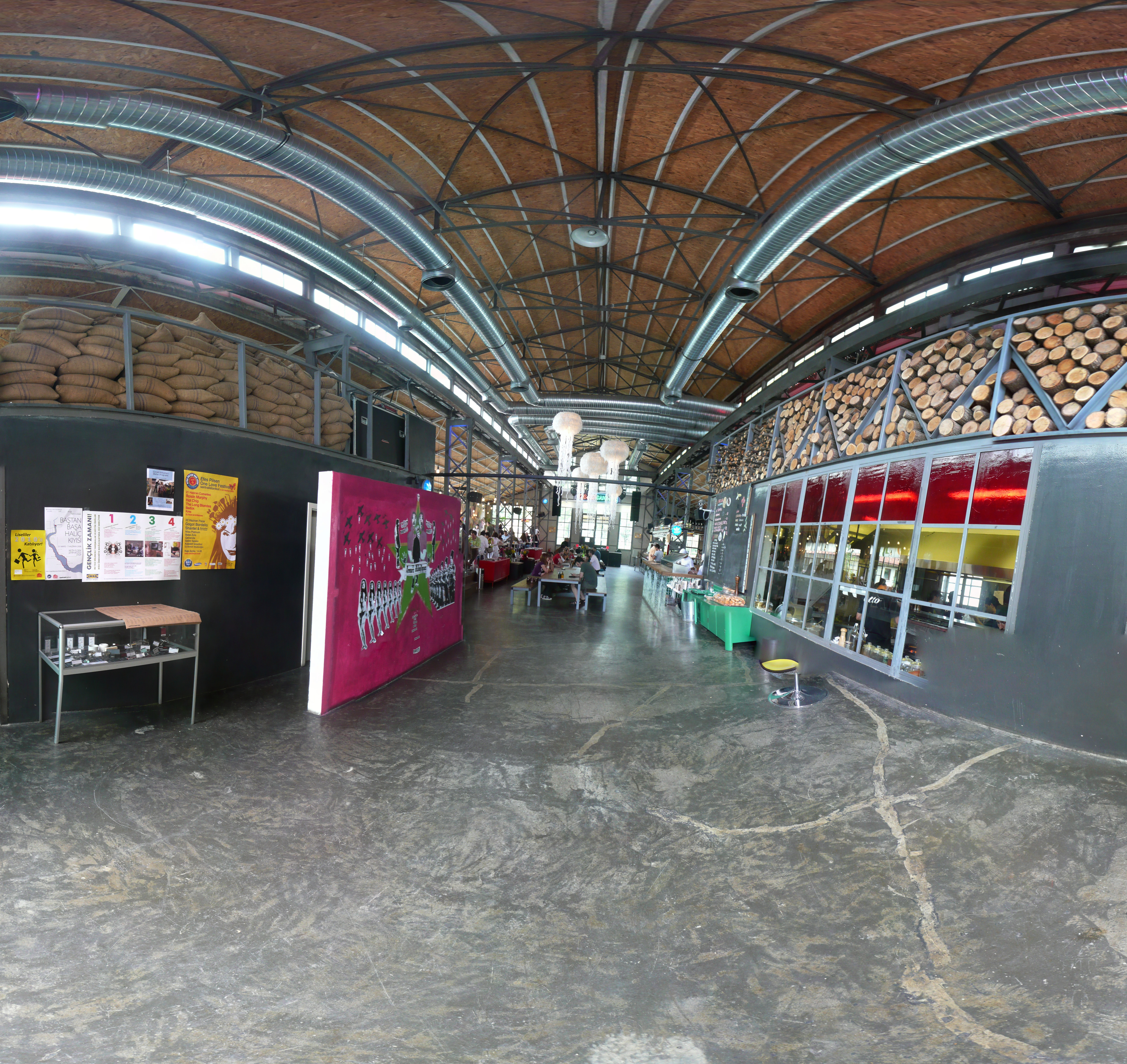 Santral Istanbul - OpenStreetMap (Info)